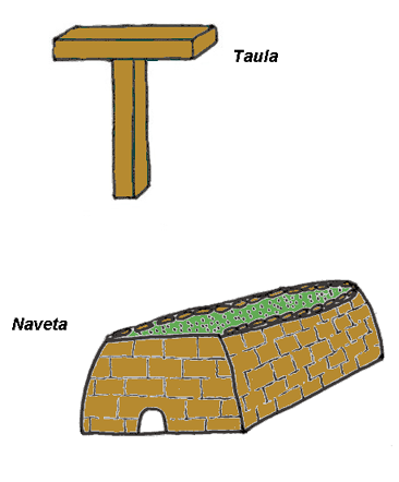 Dibujos de una taula y una naveta Dibujo creado por Rafaelji para Enciclopedia Libre Categoría:Dibujo (imagen)